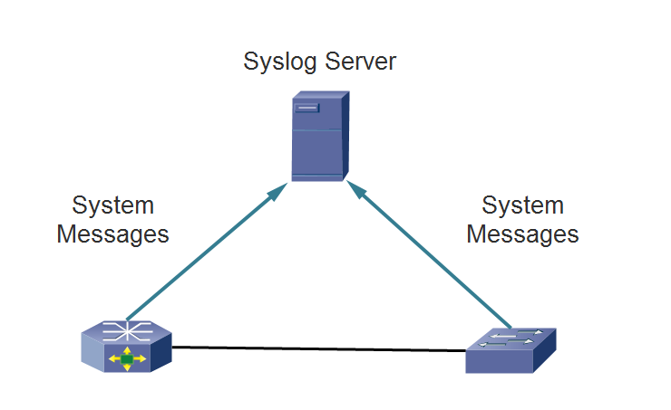 Монгол: Системийн лог серверийн үйл ажиллагаа